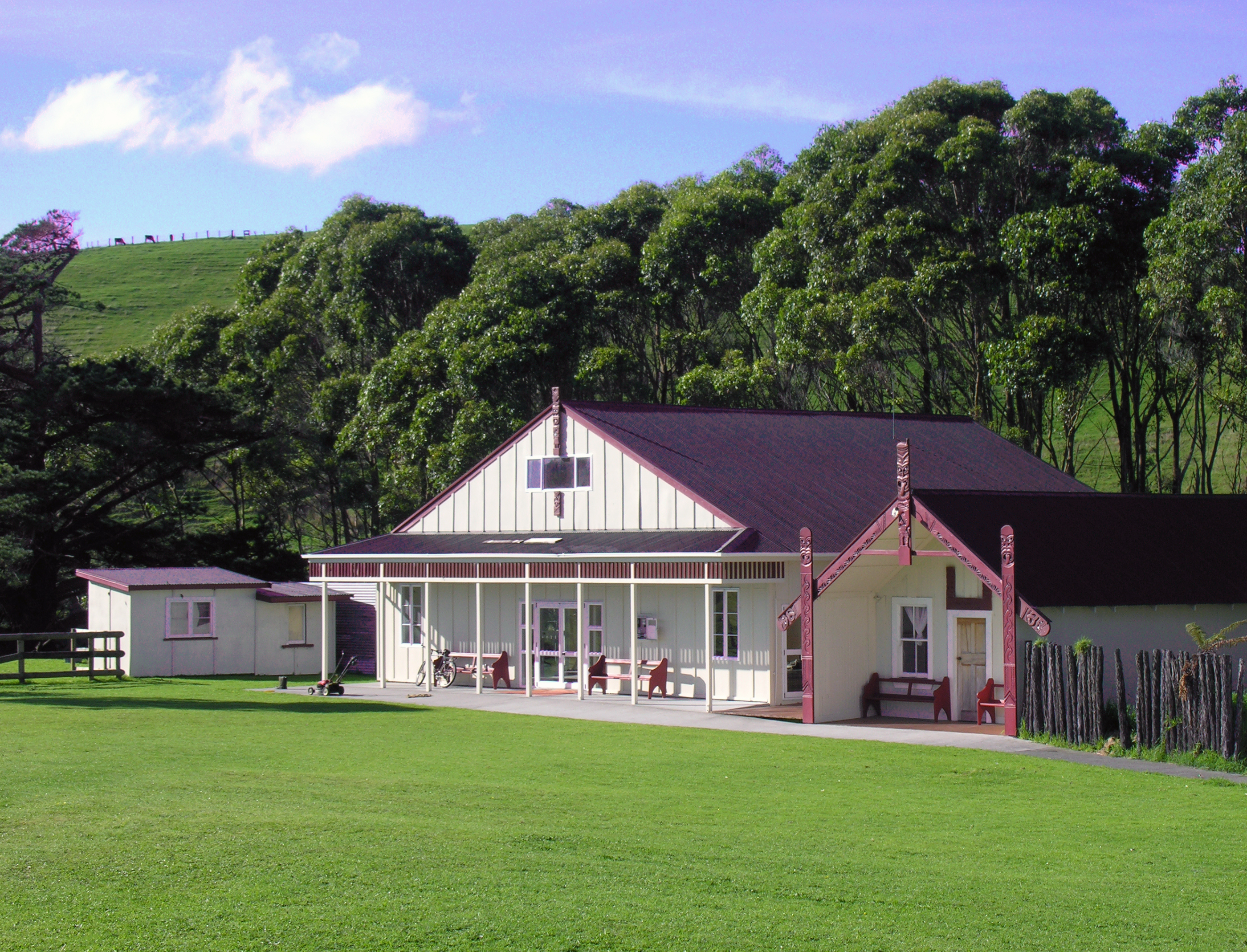 Whenuakura Marae, Whenuakura, Taranaki, New Zealand